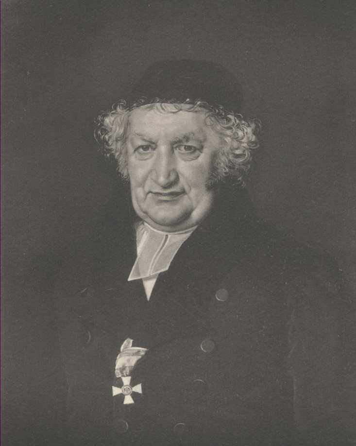 Bildnis Johann Ernst Parow